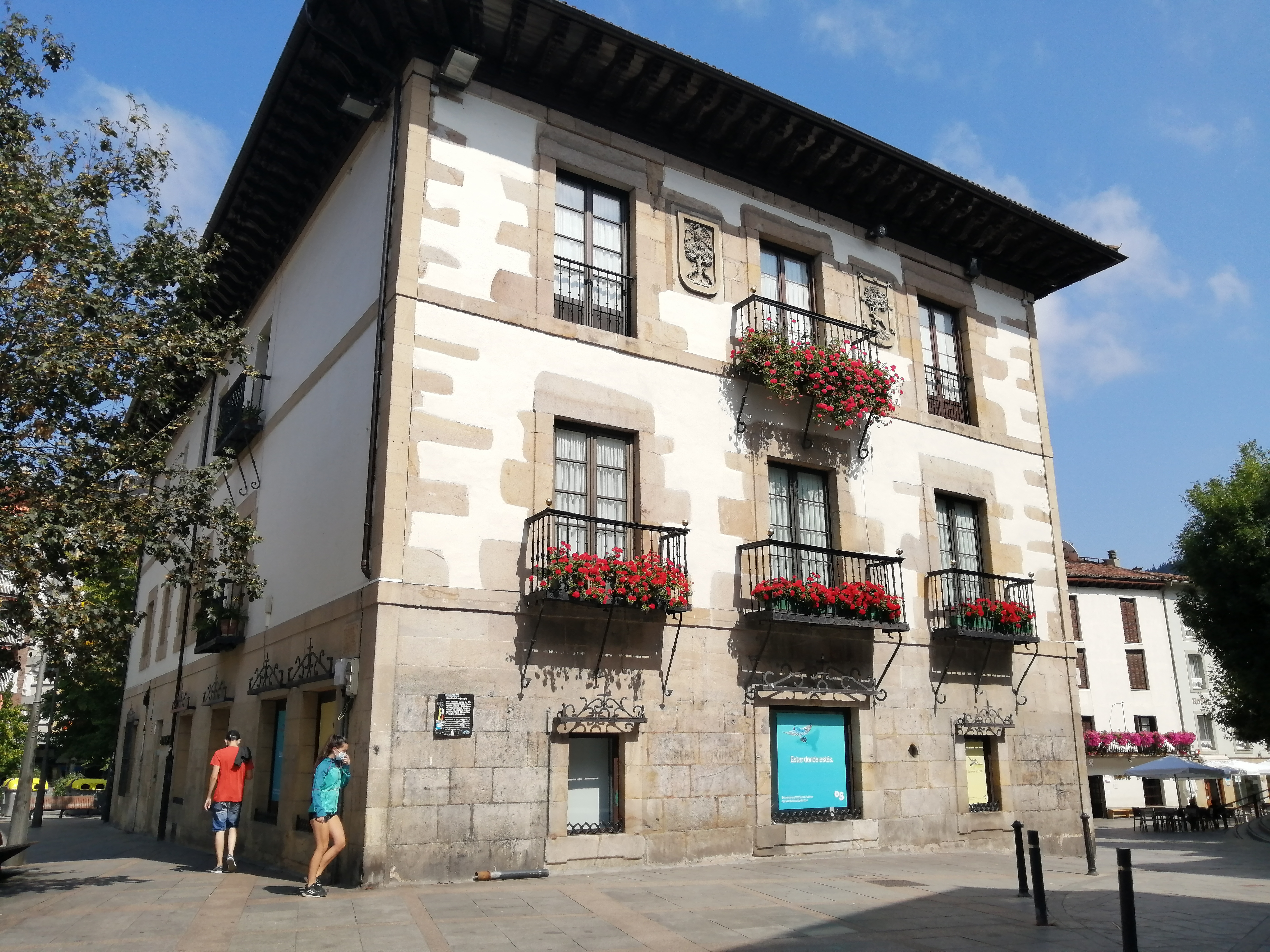 Barrutia-Salinas jauregia, Arrasate